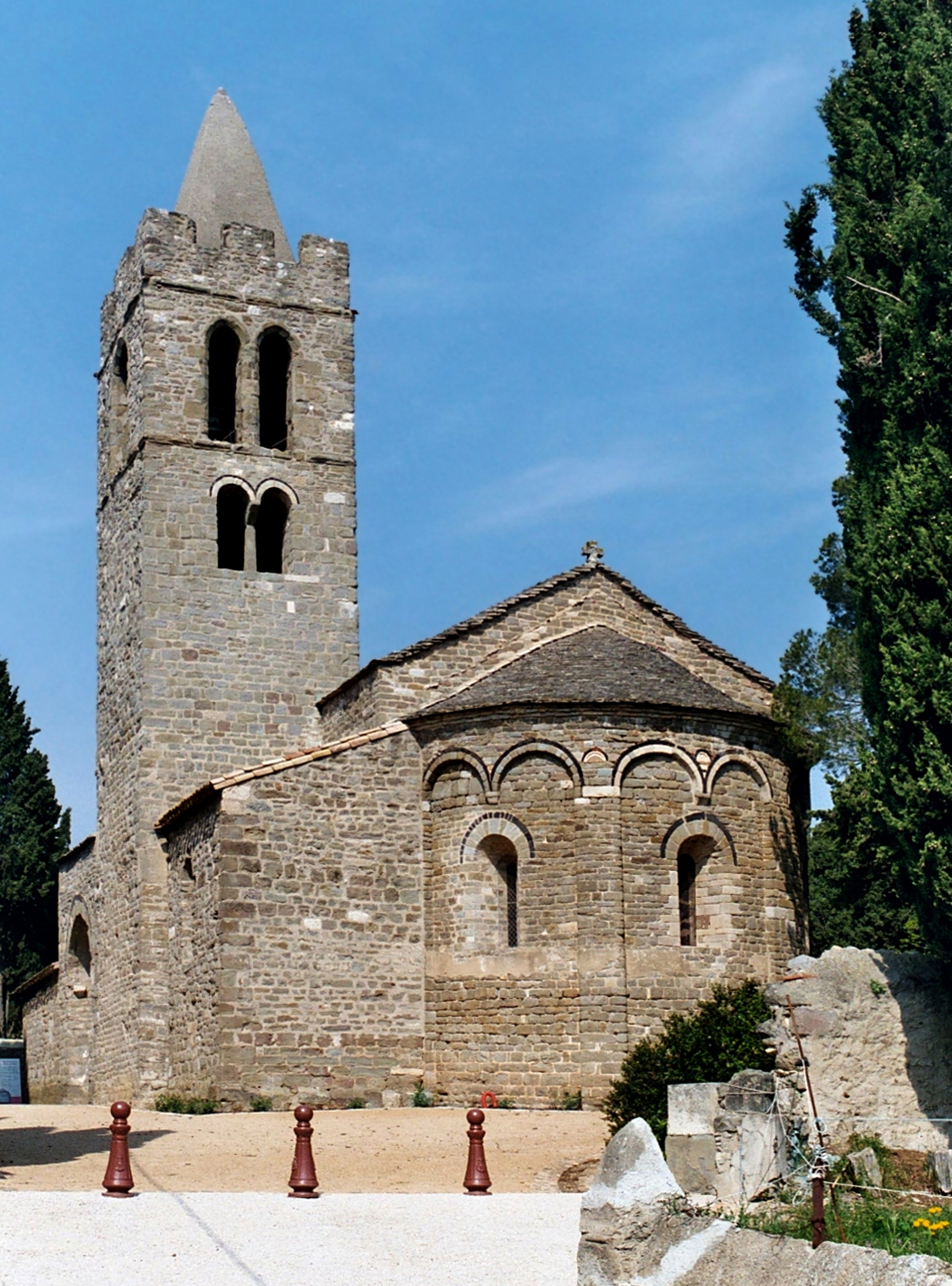 France - Languedoc - Aude - Église Saint-Saturnin de Pouzols-Minervois